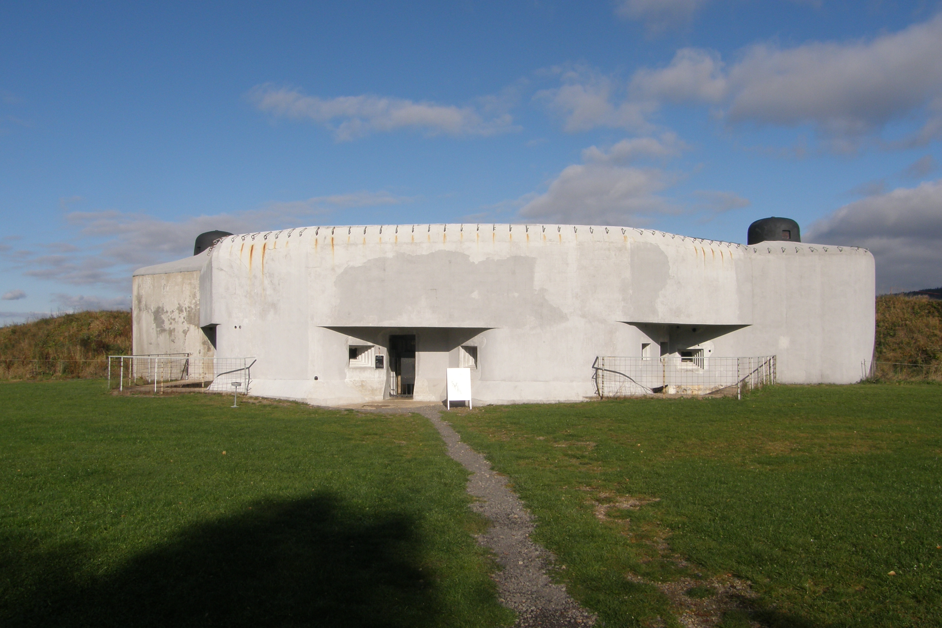 Pěchotní srub K-S 14 U cihelny